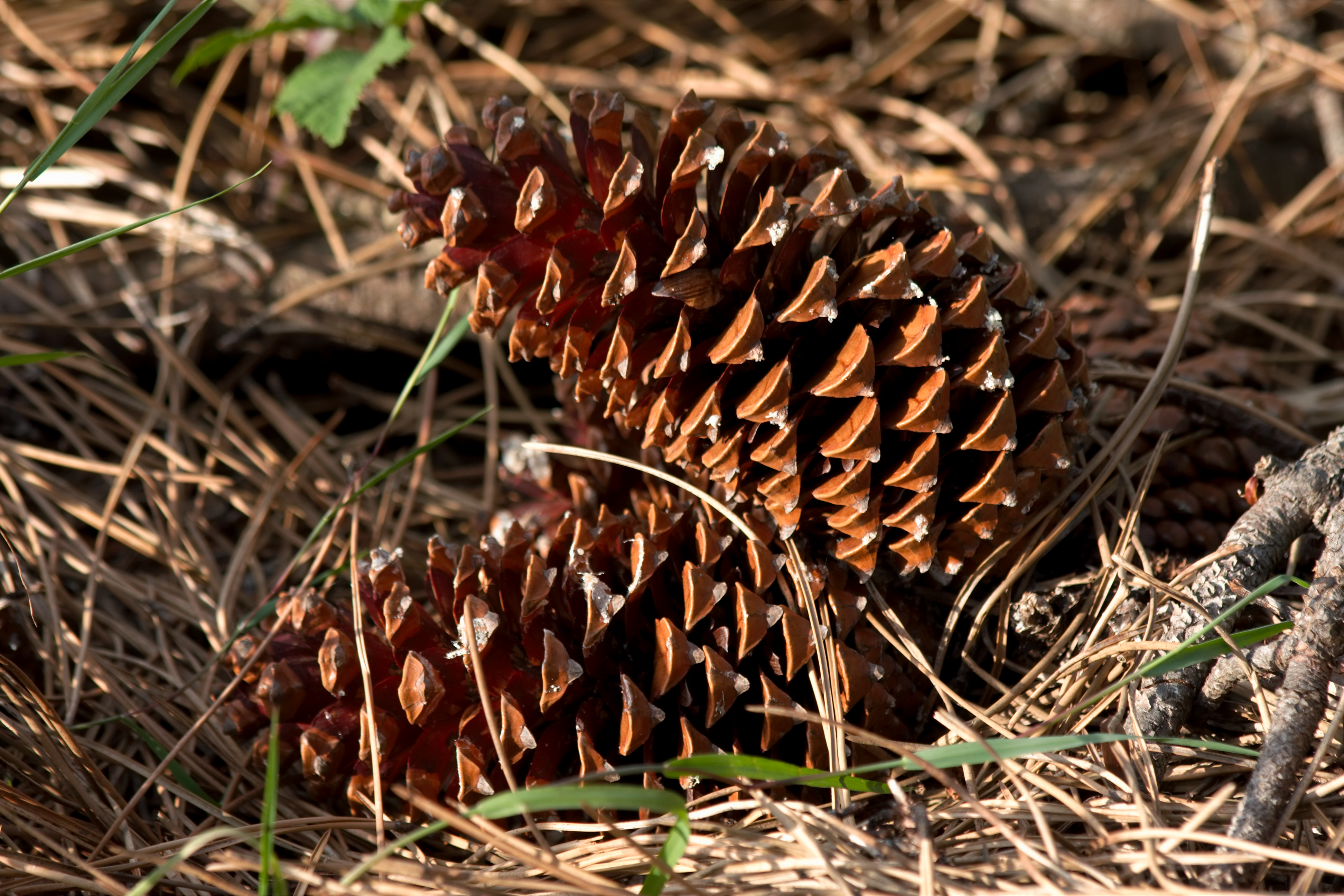 Pinus pinaster cones. Igalia Summit, Nigrán, Pontevedra, Spain.